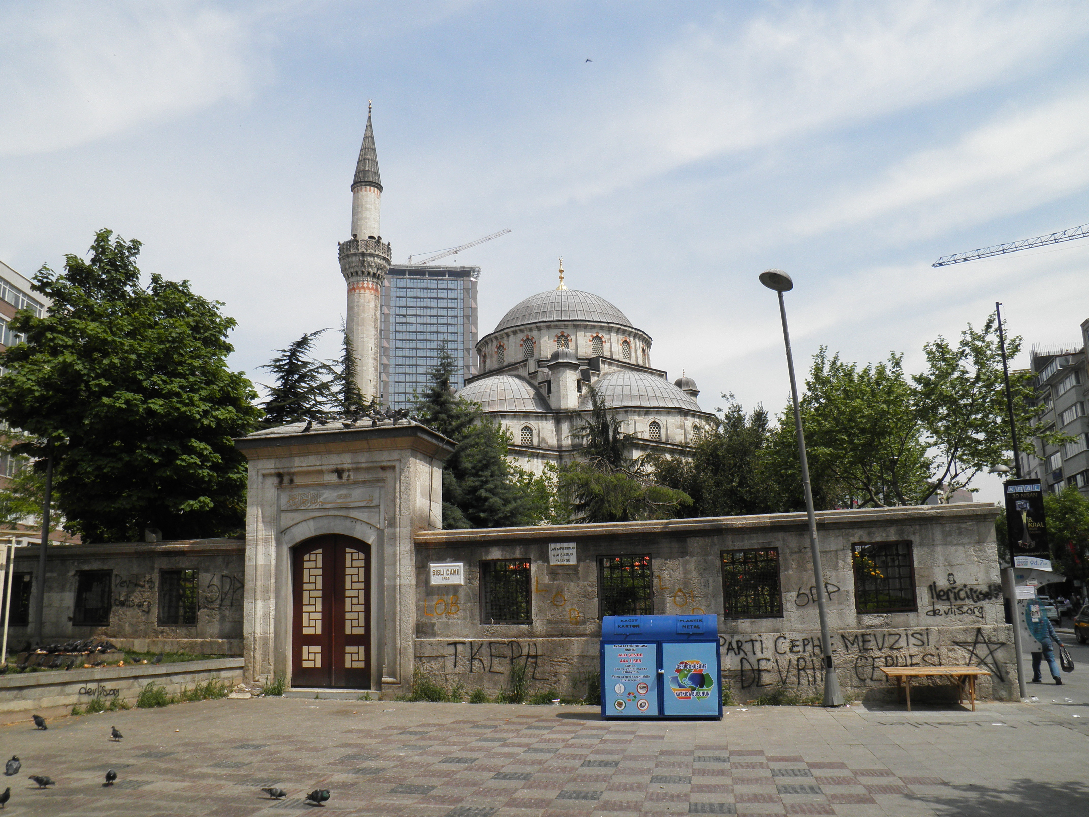 Şişli Merkez Cami